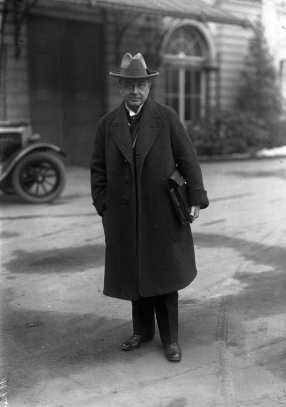 Minister Jarres, Oberbürgermeister von Duisburg wurde von den Nationalen Kreisen Deutschlands für den Reichspräsidentenposten aufgestellt. Letzte Aufnahme desselben.